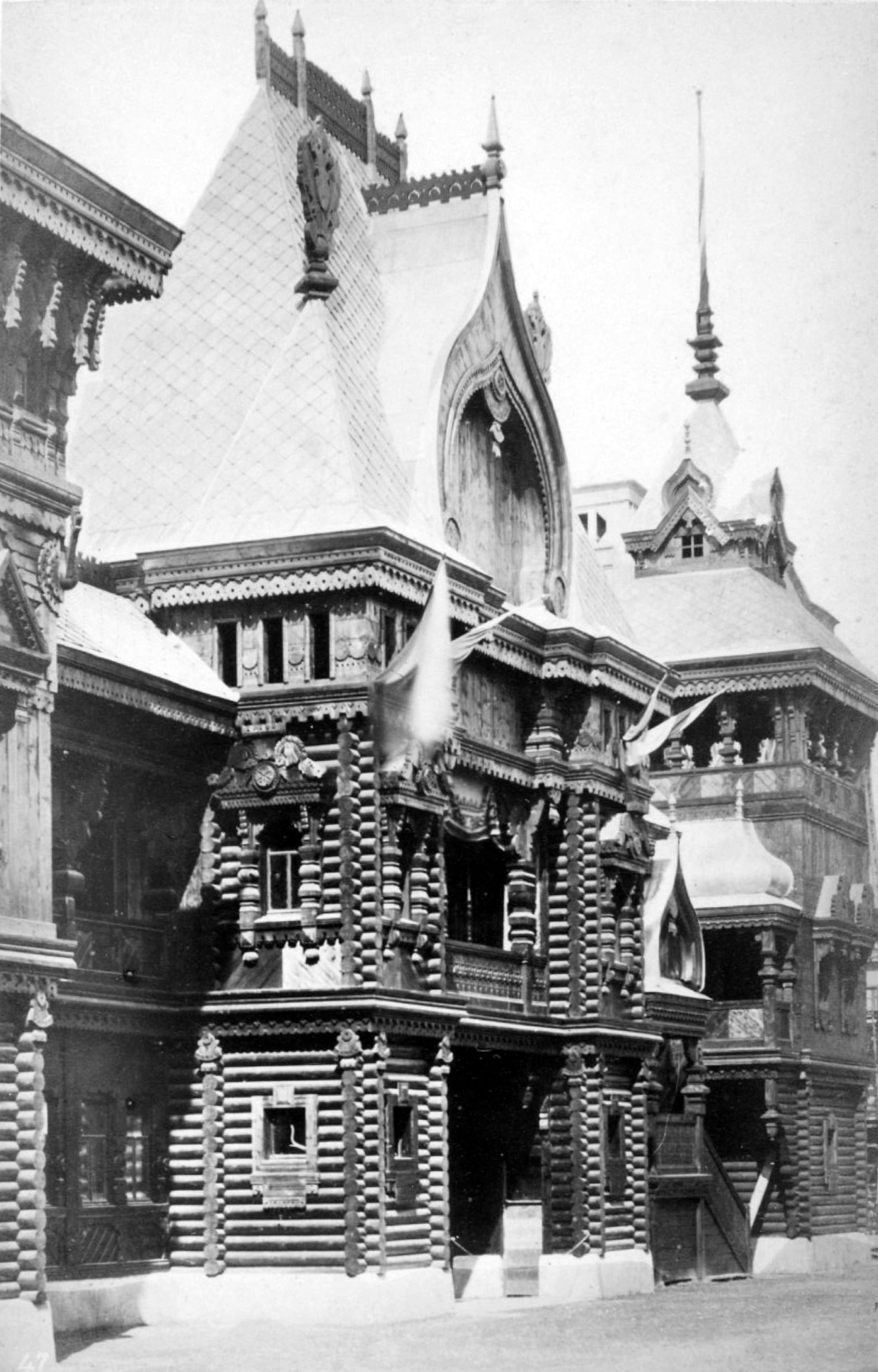 Façade du pavillon russe dans la rue des nations de l'exposition universelle de 1878 à Paris